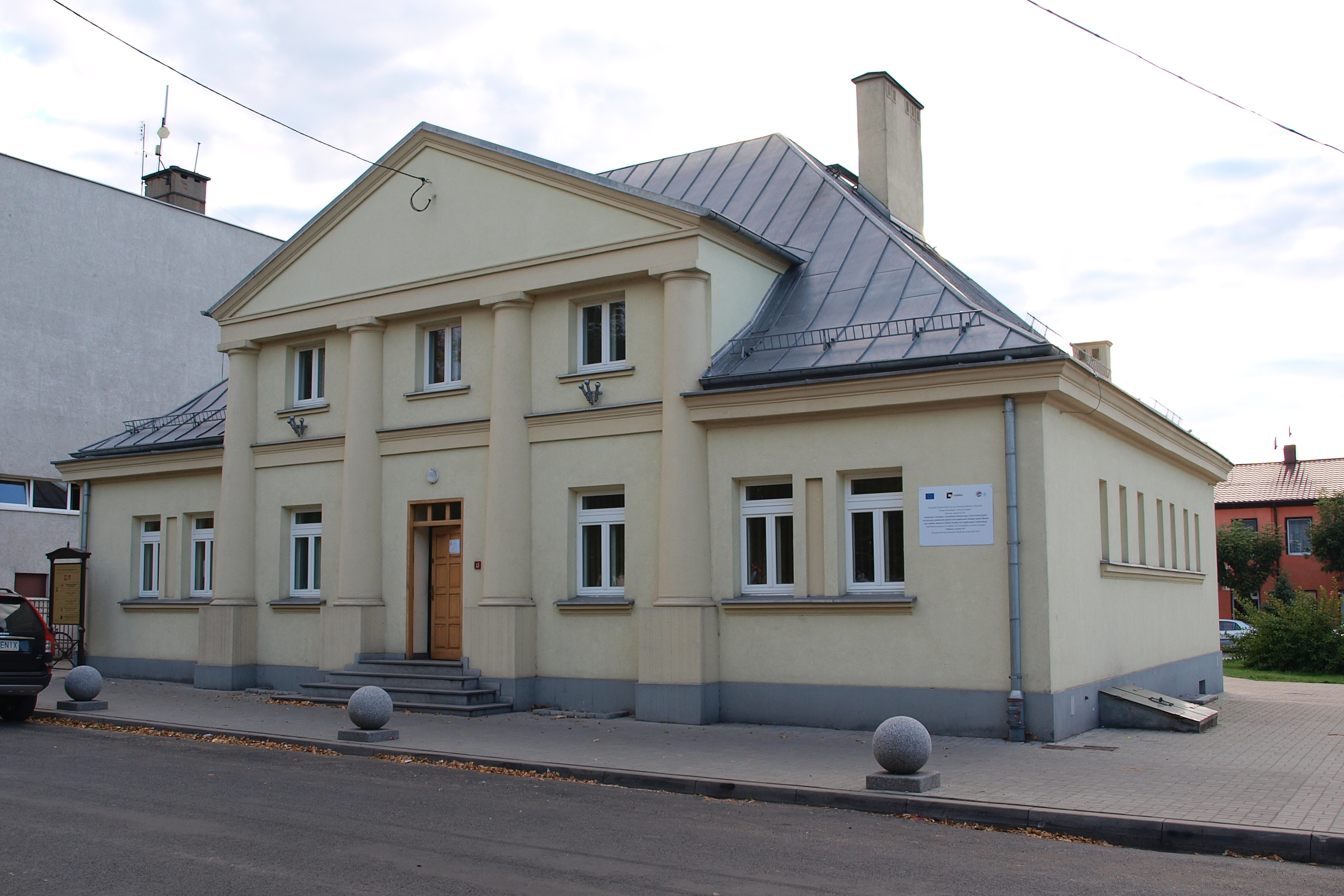 Łaźnia miejska w Błaszkach widok od ulicy.